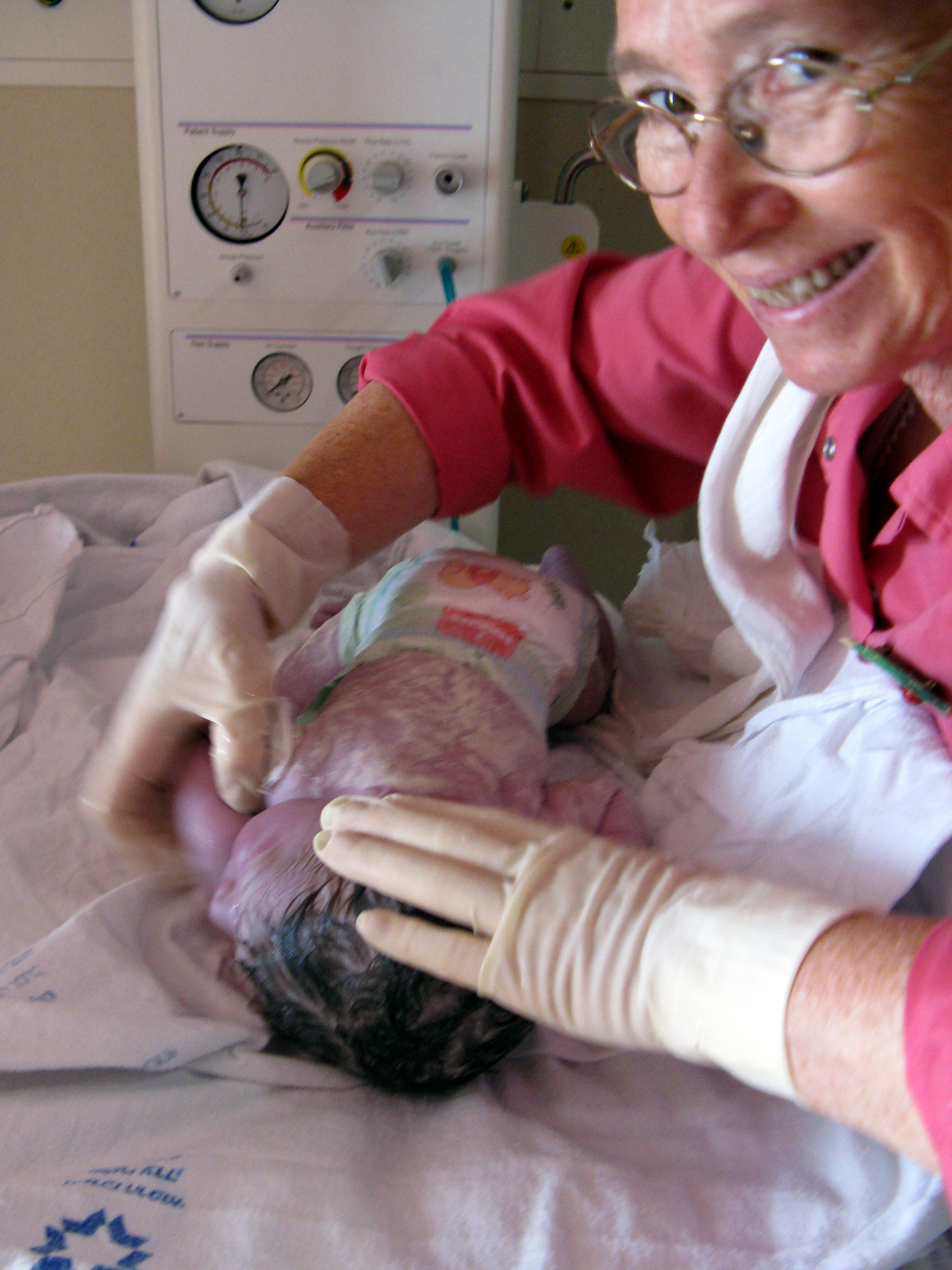 Situs informasi dan berita untuk ibu dan anak. Situs kami berisikan informasi perkembangan bayi, rekomendasi susu bayi, mitos bayi / ibu dan masa kehamilan maupun berbagai informasi penting lainnya.